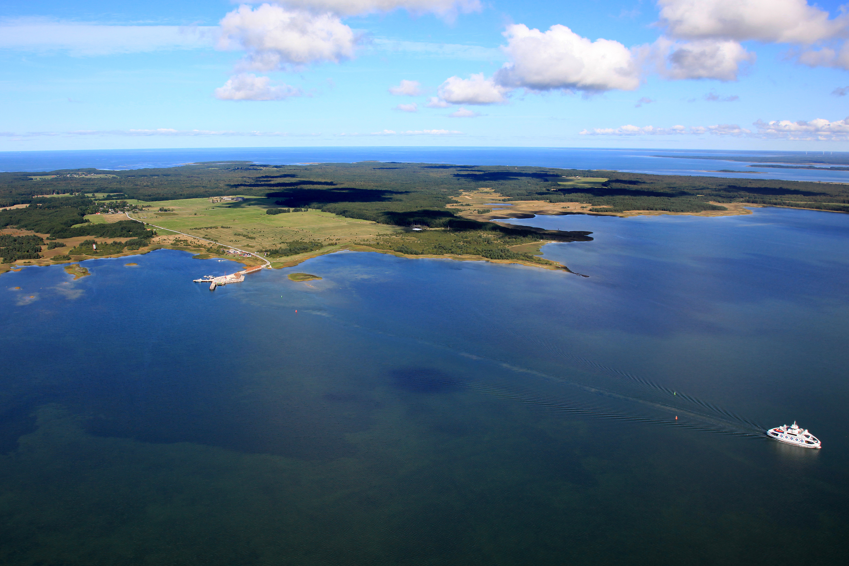 Vormsi saar